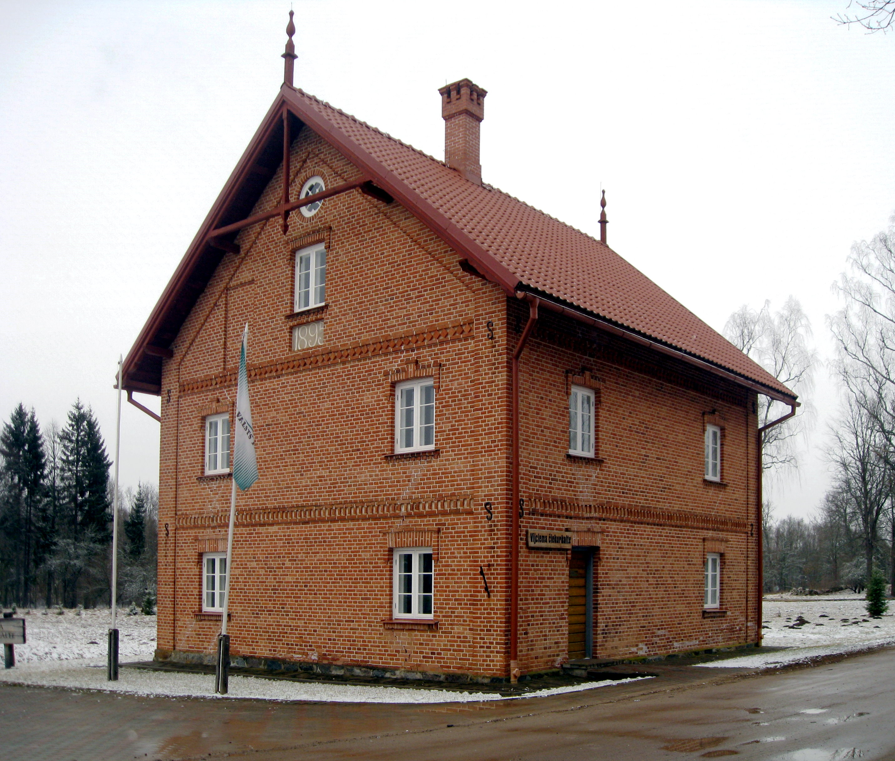 Vijciema pagasts, LV-4733, Latvia